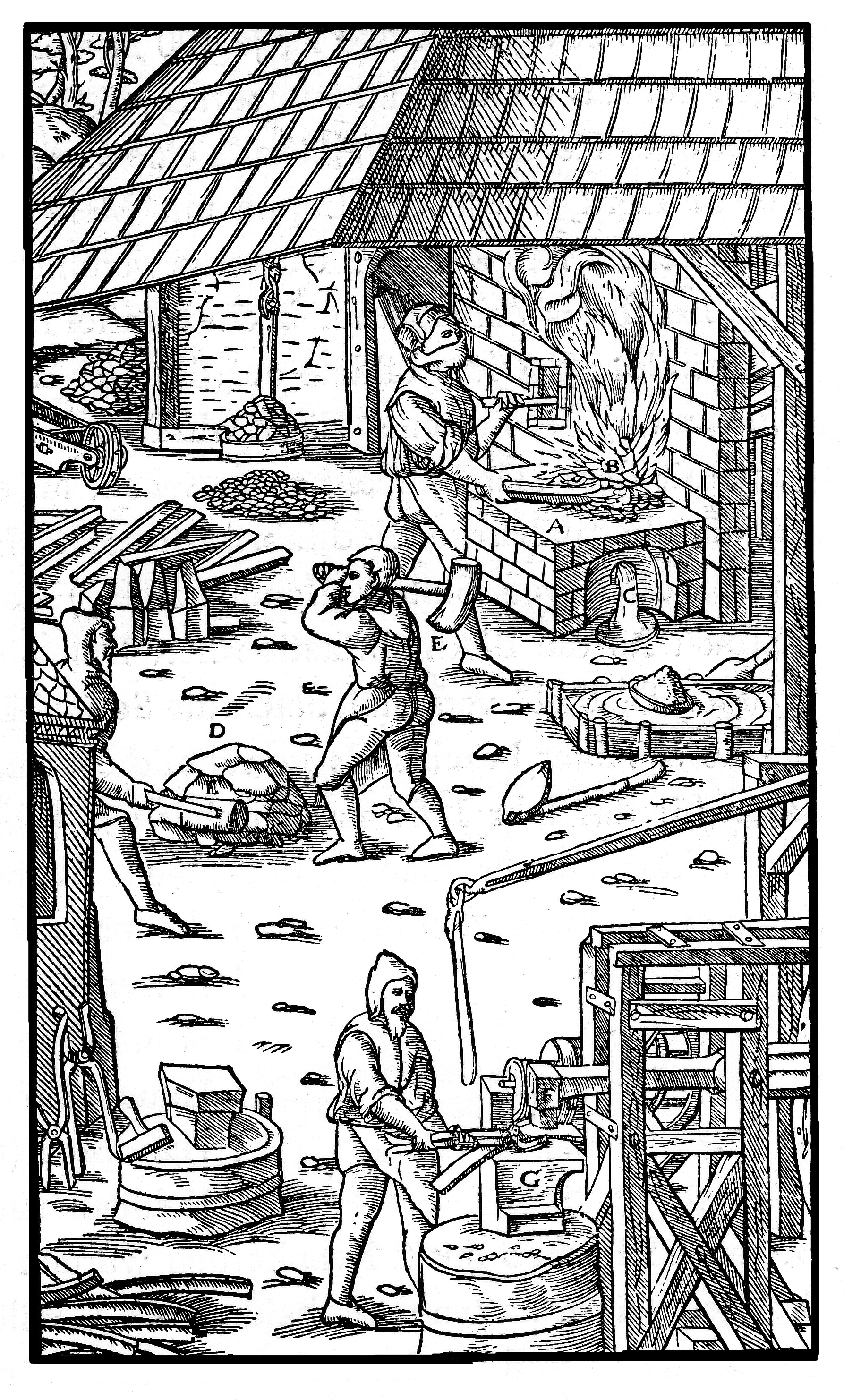 Rennwerk nach G. Agricola: De re metallica libri XII. Basel 1556 S. 339